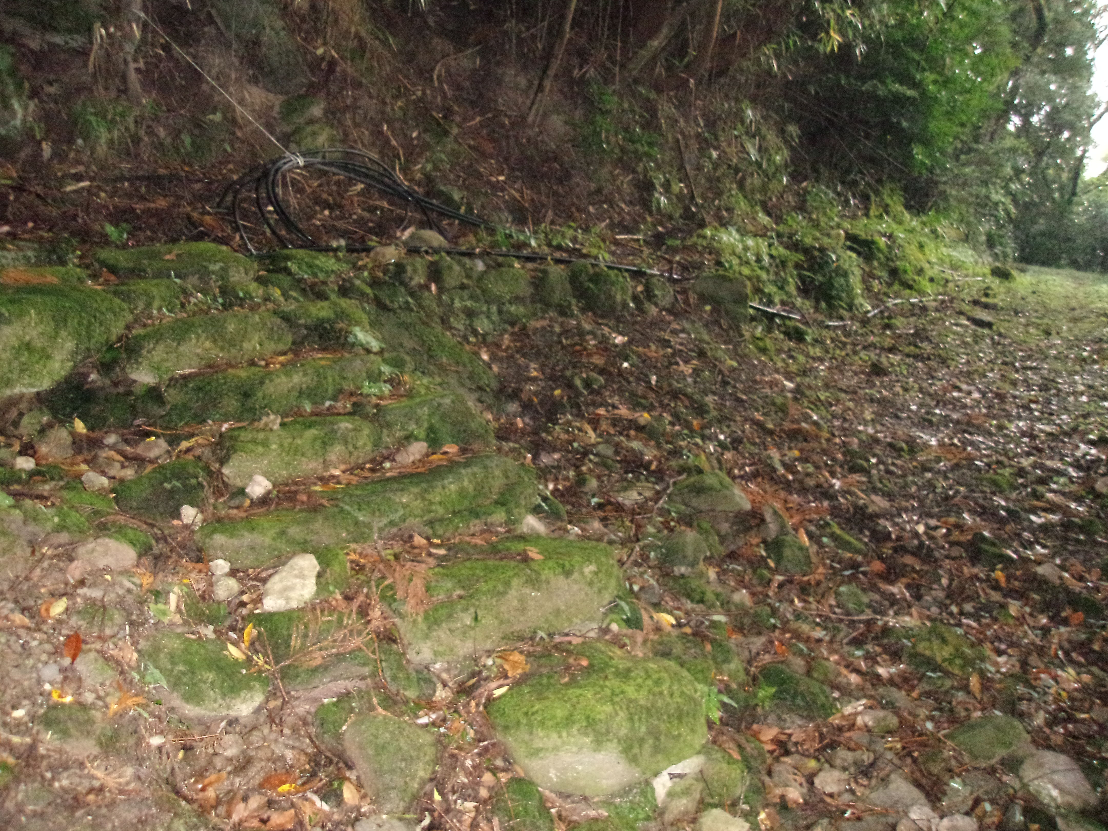 世界遺産「石見銀山」の構成資産である銀山街道鞆ヶ浦道 上野集落～西谷集落間の石畳